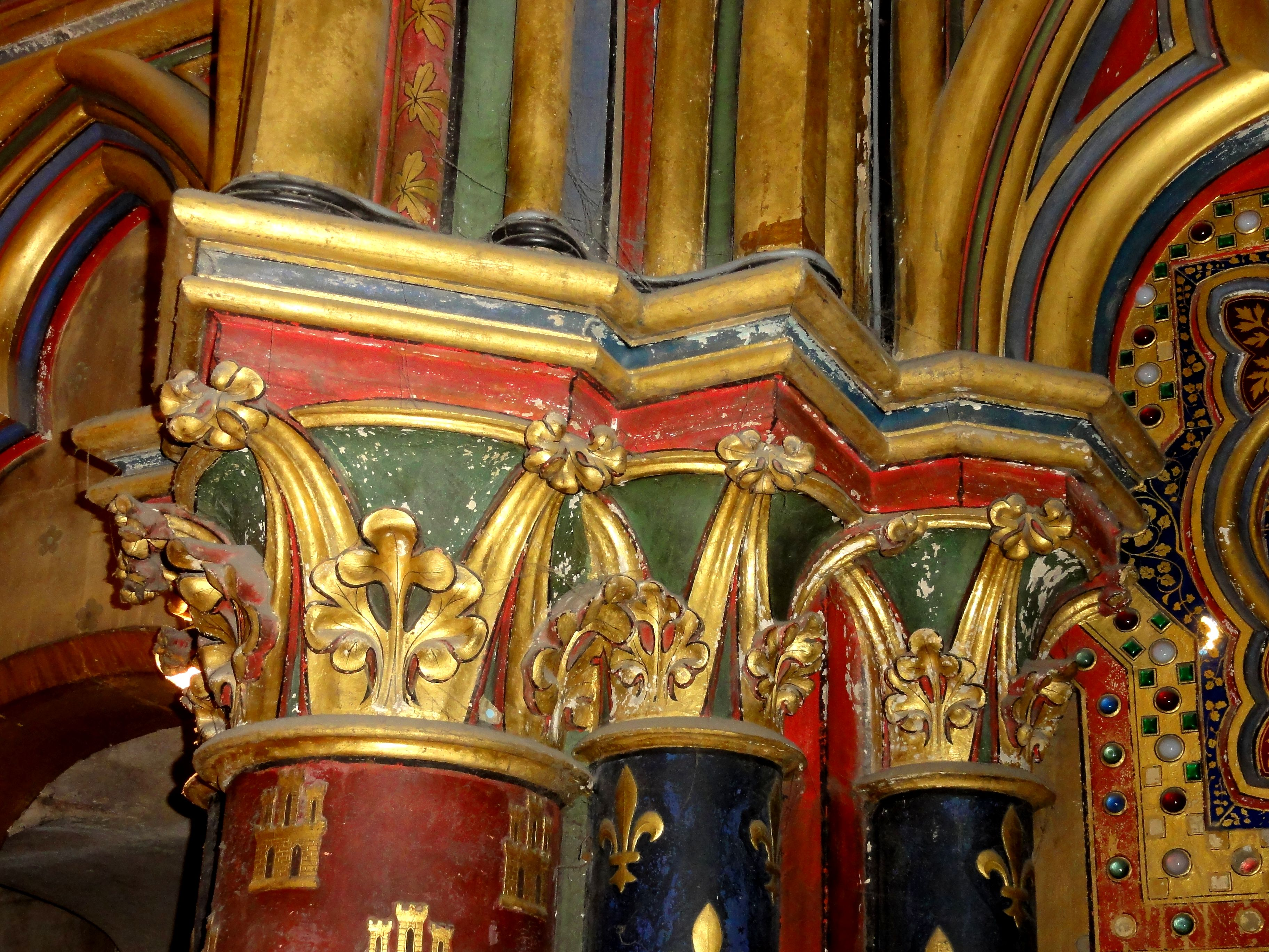 Chapelle basse, chapiteaux au revers de la façade.